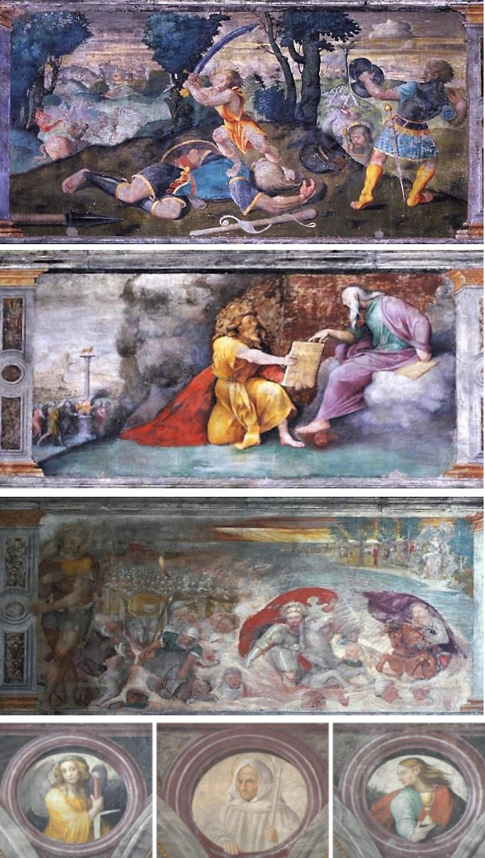 Alcune parti dell'affresco facente parte del ciclo Storie del Vecchio Testamento realizzato dal pittore veronese Giovan Francesco Caroto per il lato settentrionale della navata centrale della chiesa di Santa Maria in Organo a Verona.